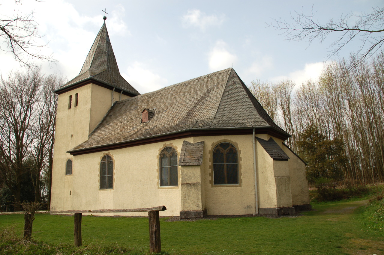 Fürstenberg Kapelle 51.472787,7.946569